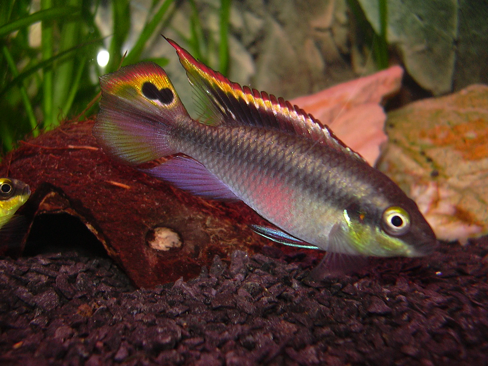 geen auteursrechtensituatie, zelf gemaakt